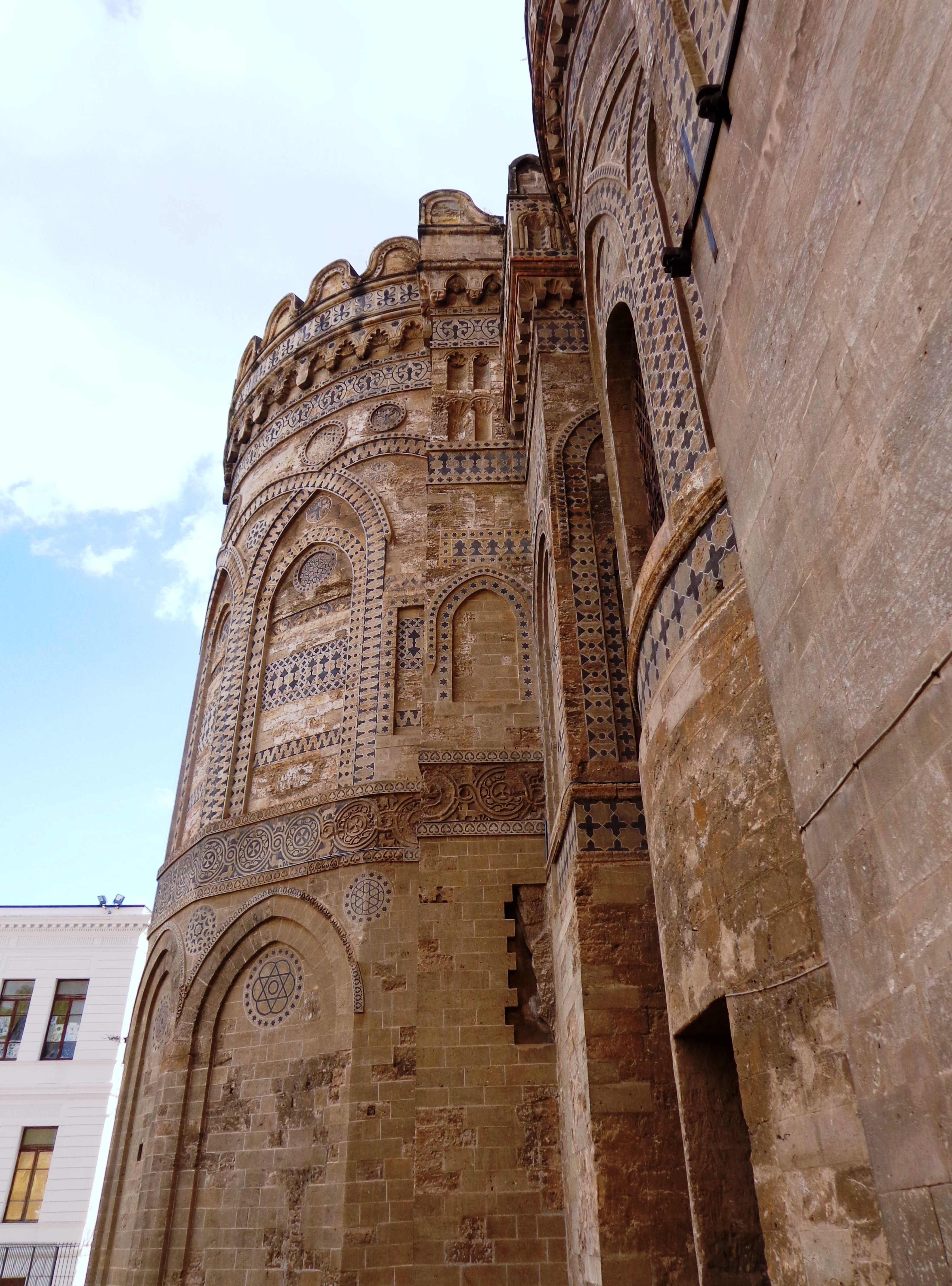 Esterno Abside